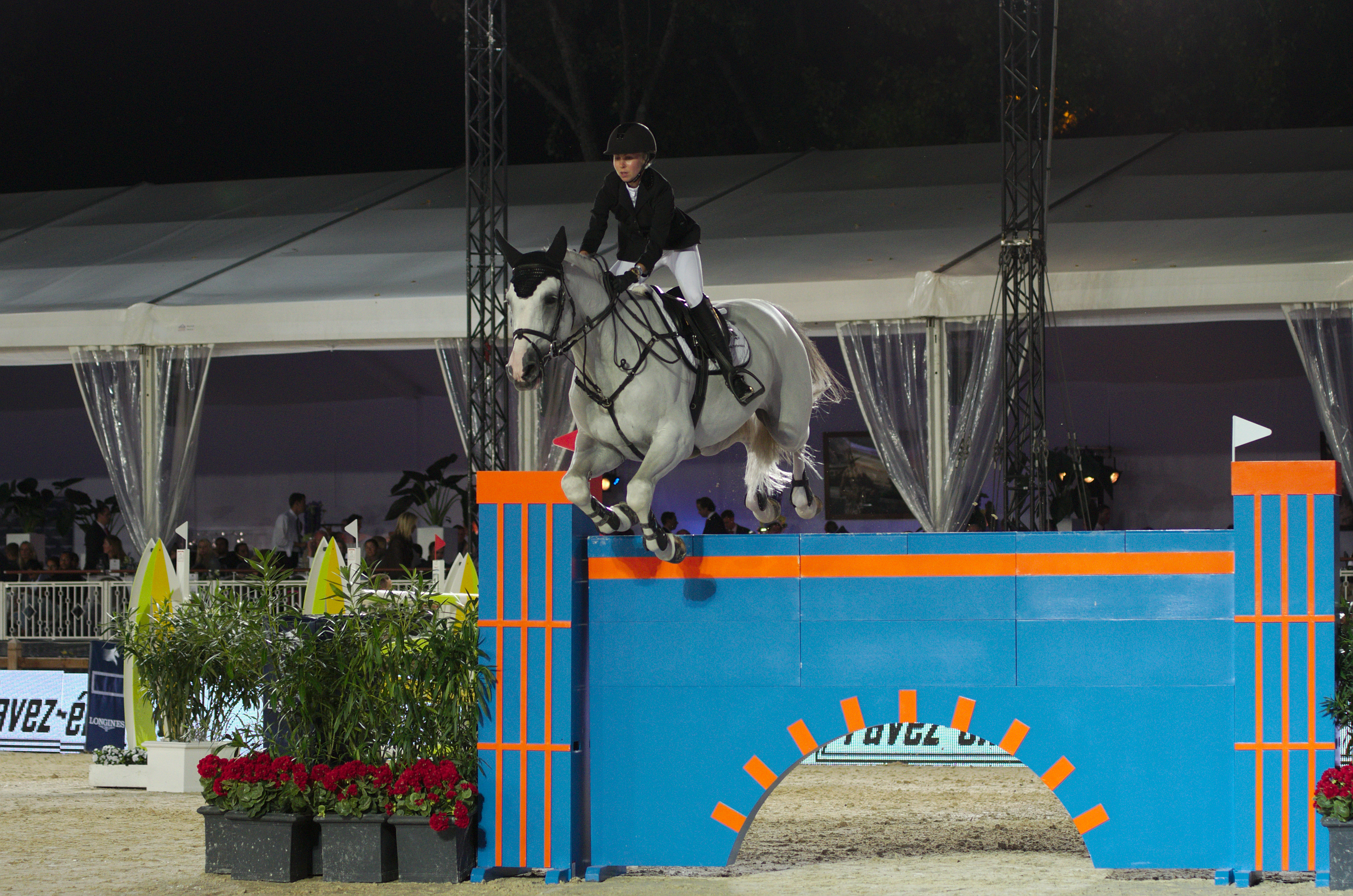 2013 Longines Global Champions - Lausanne - 13-09-2013: Emilie Martinsen / Caballero